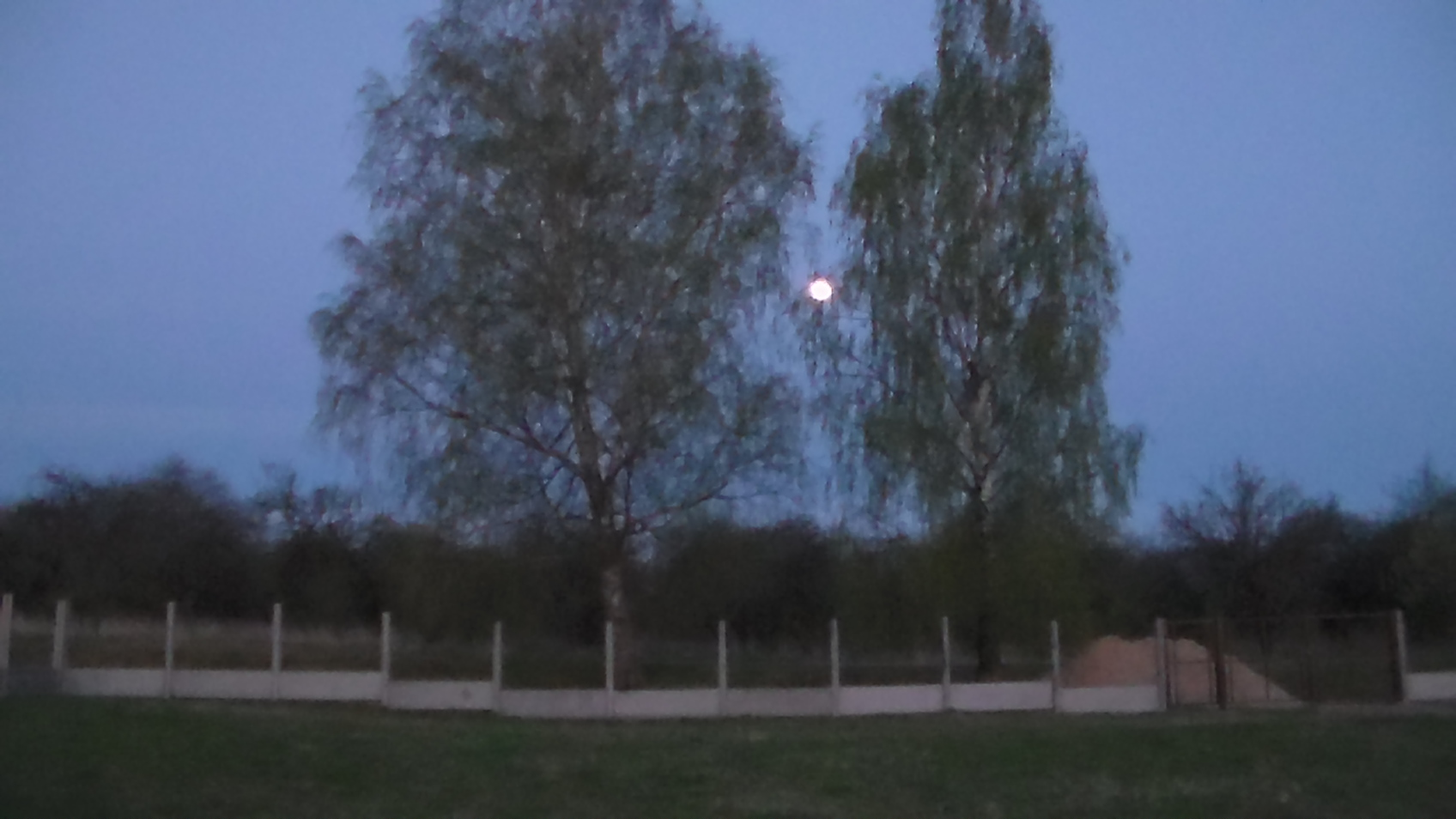 Наш участок ночью в Врублёвщине.